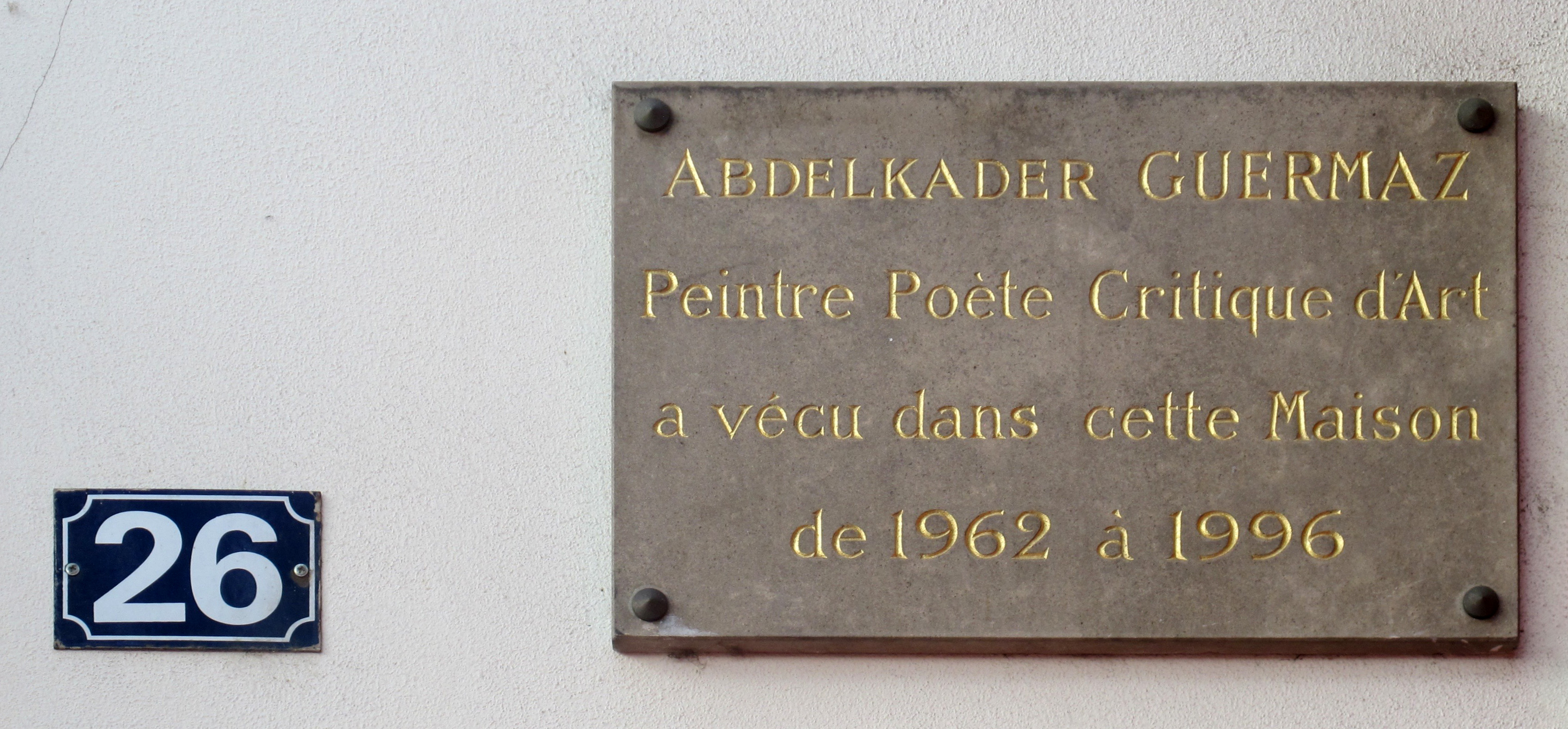 Plaque en hommage au peintre algérien Abdelkader Guermaz, 26 quai du Louvre (Paris, 1er).